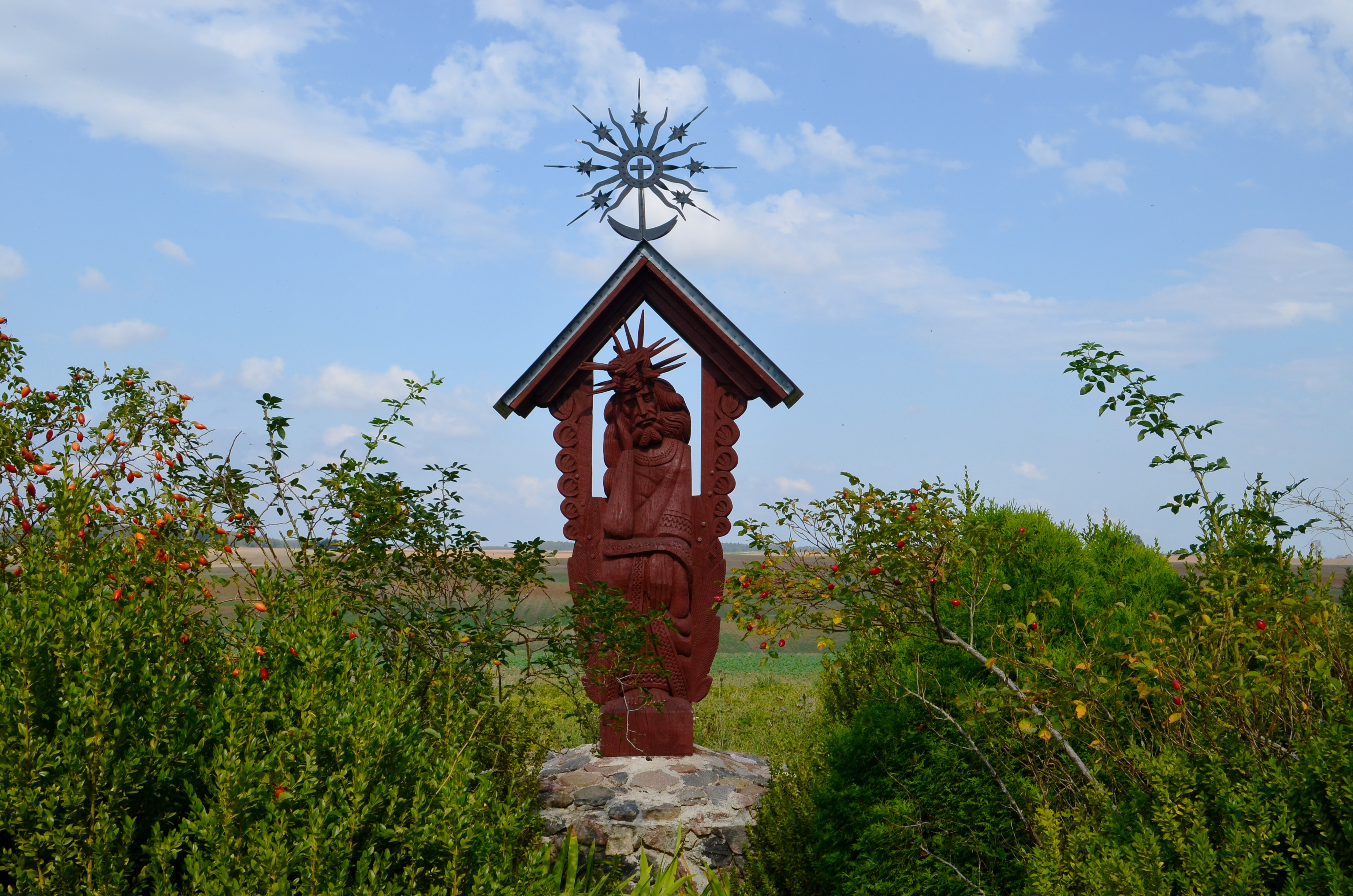 Rūpintojėlis Vantainiuose, Kėdainių raj.